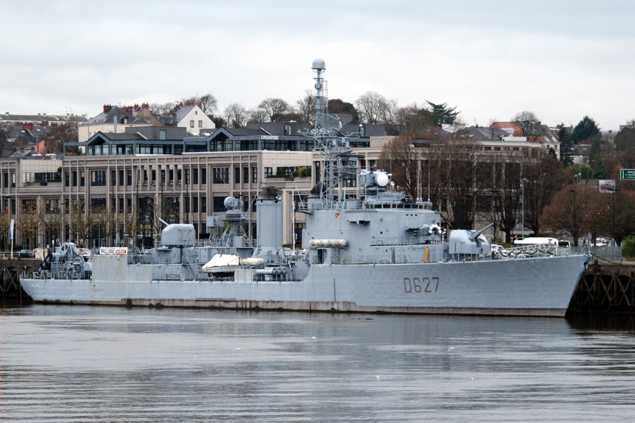 Maille Breze à Nantes